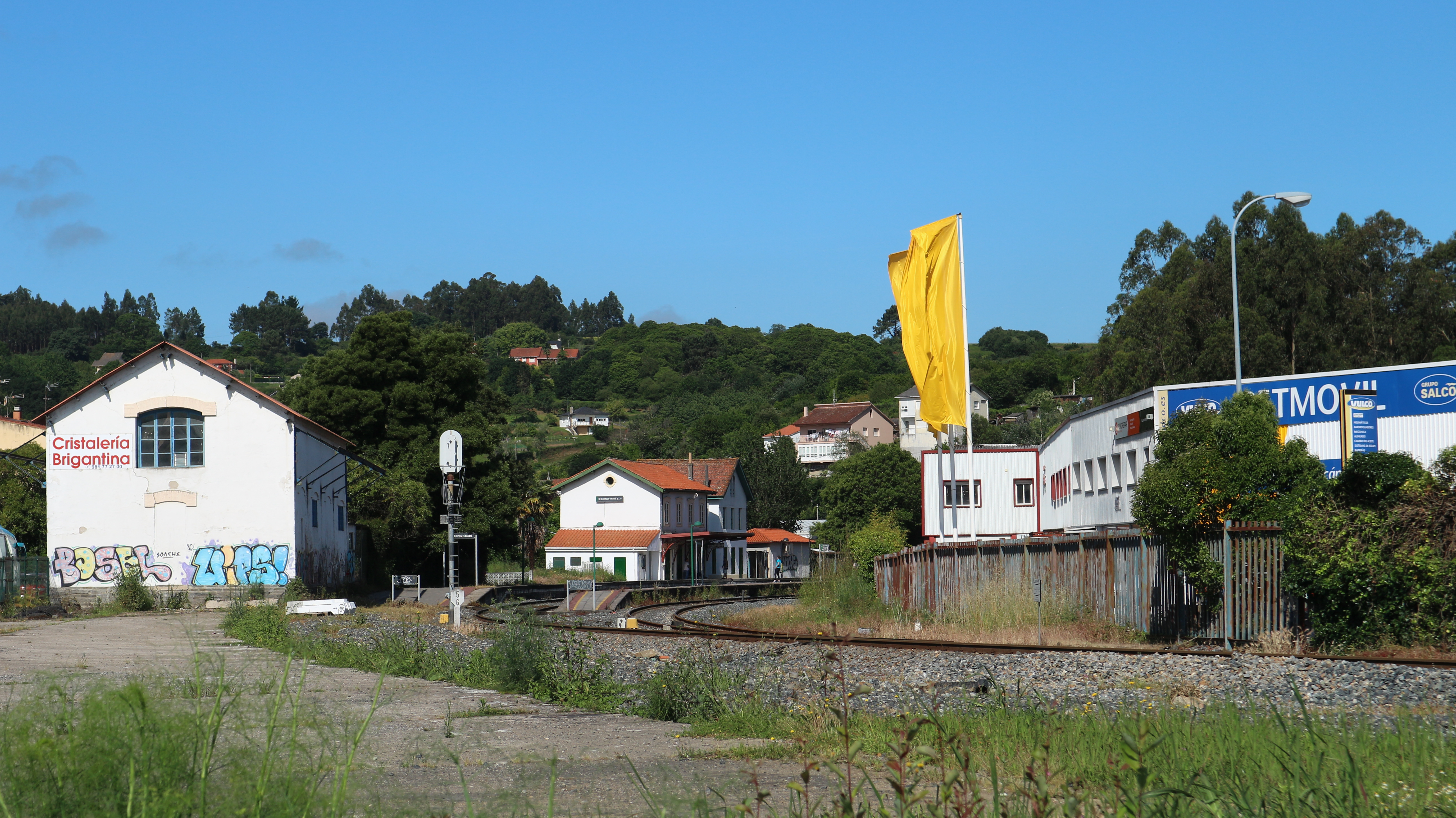 Estación de ferrocarril Betanzos-Cidade, Betanzos.